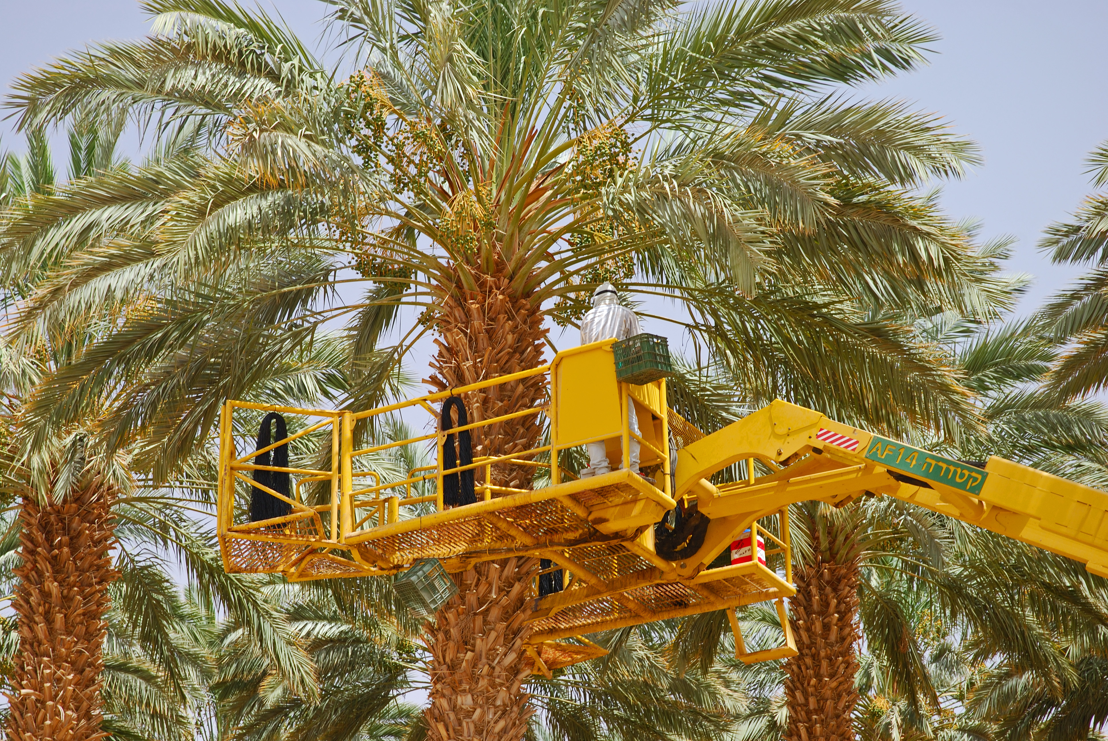 Dattelernte in Israel, ein Beispiel für Landwirtschaft in ariden Räumen